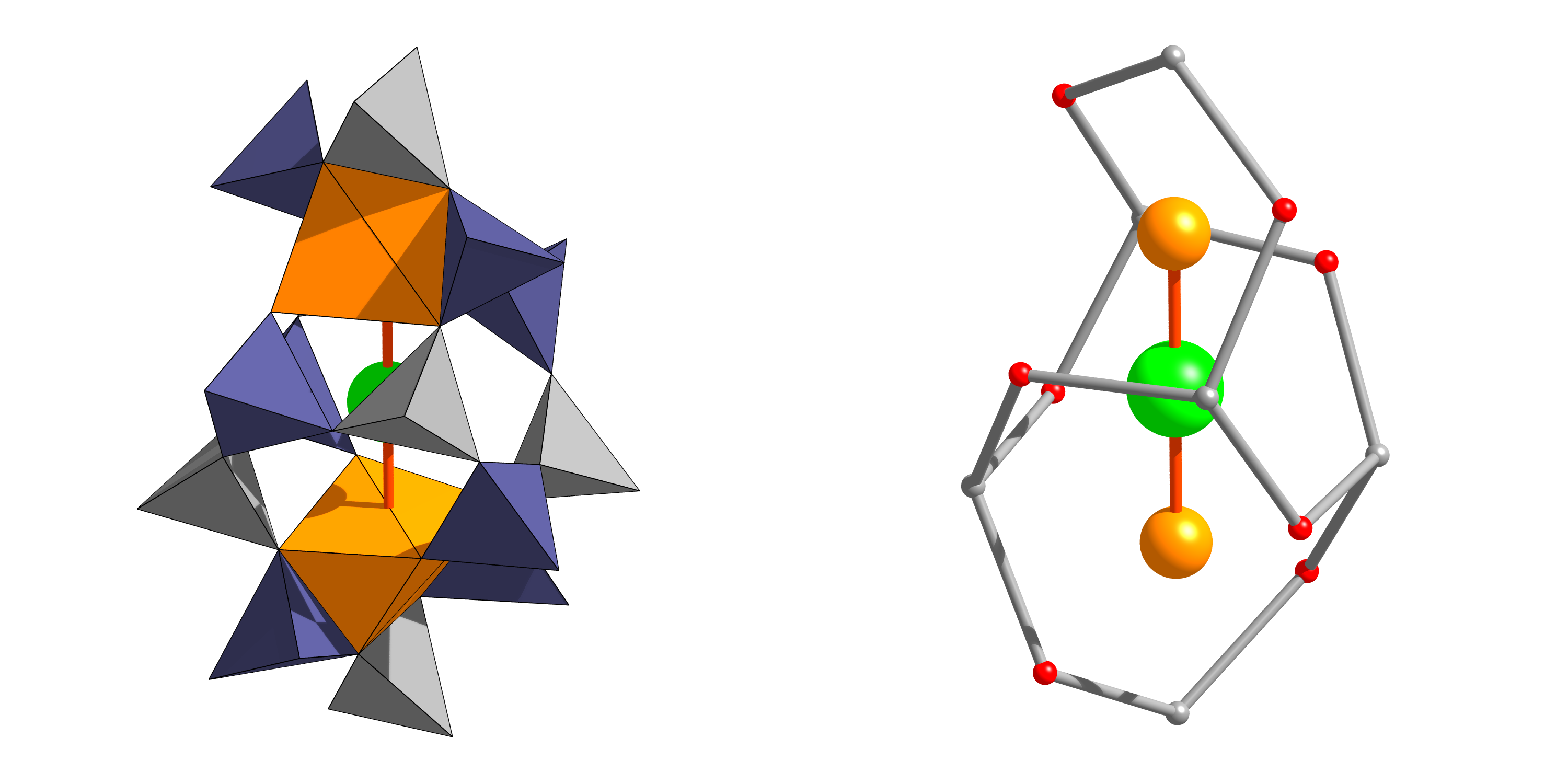 Mayenitstruktur: Chlor (grün) im Zentrum der Kafige, gebunden an zwei Calcium (orange), umgeben von eckenverknüpften Aluminiumtetradern (T1: violett, T2: grau); links: Polyeder, rechts: Atome (Al auf T1: rot, Al auf T2: grau) Daten von: Tomoyuki Iwata, Masahide Haniuda, Koichiro Fukuda (2008): Crystal structure of Ca12Al14O32Cl2 and luminescence properties of Ca12Al14O32Cl2:Eu2+, Journal of Solid State Chemistry 181, pp. 51-55 Berechnung der Bilddaten: Larry W. Finger, Martin Kroeker, and Brian H. Toby, DRAWxtl, an open-source computer program to produce crystal-structure drawings, J. Applied Crystallography V40, pp. 188-192, 2007 Rendering: POVRAY